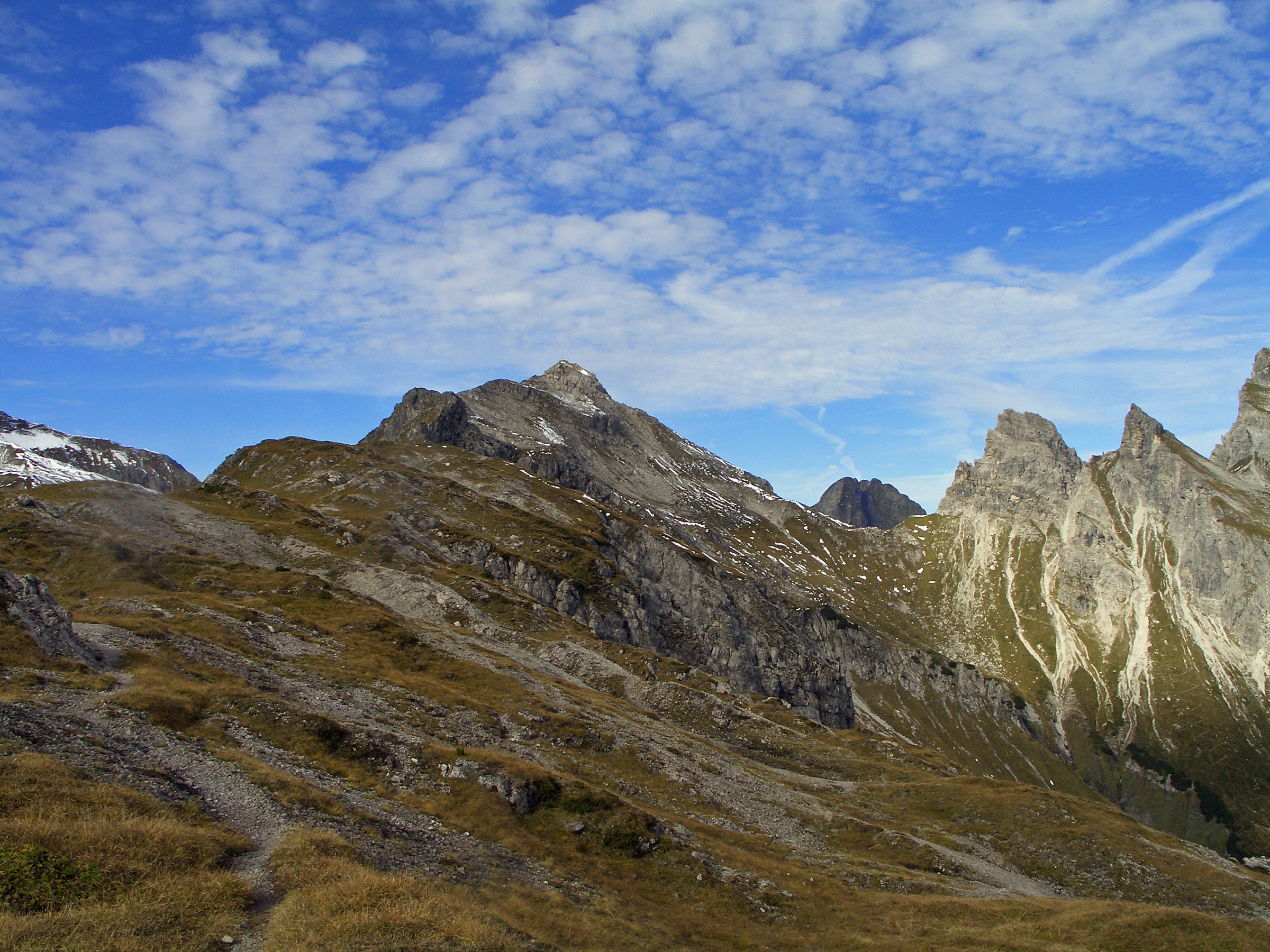 Jochspitze, Höfats und Höllhörner vom Kanzberg